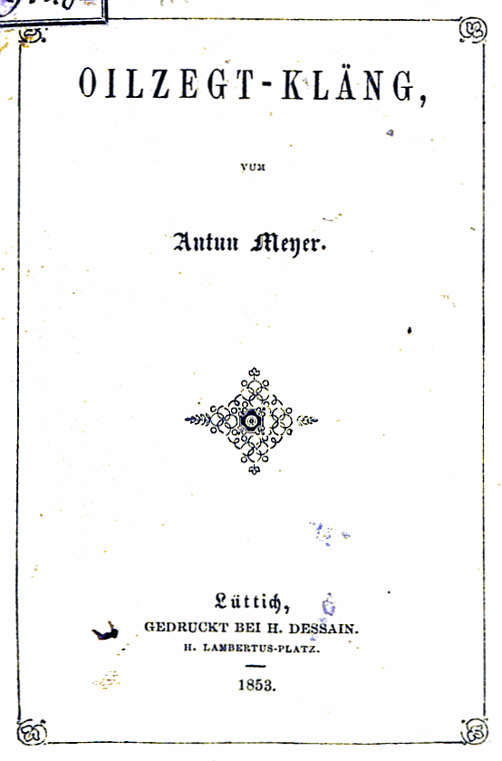 Bannenzecht Titelblat vun der Originaleditioun vum Buch: Antun Meyer, 1953. Oilzegt-Kläng. Lüttich, gedruck bei H. Dessain. H. Lambertus-Platz. 108 S.